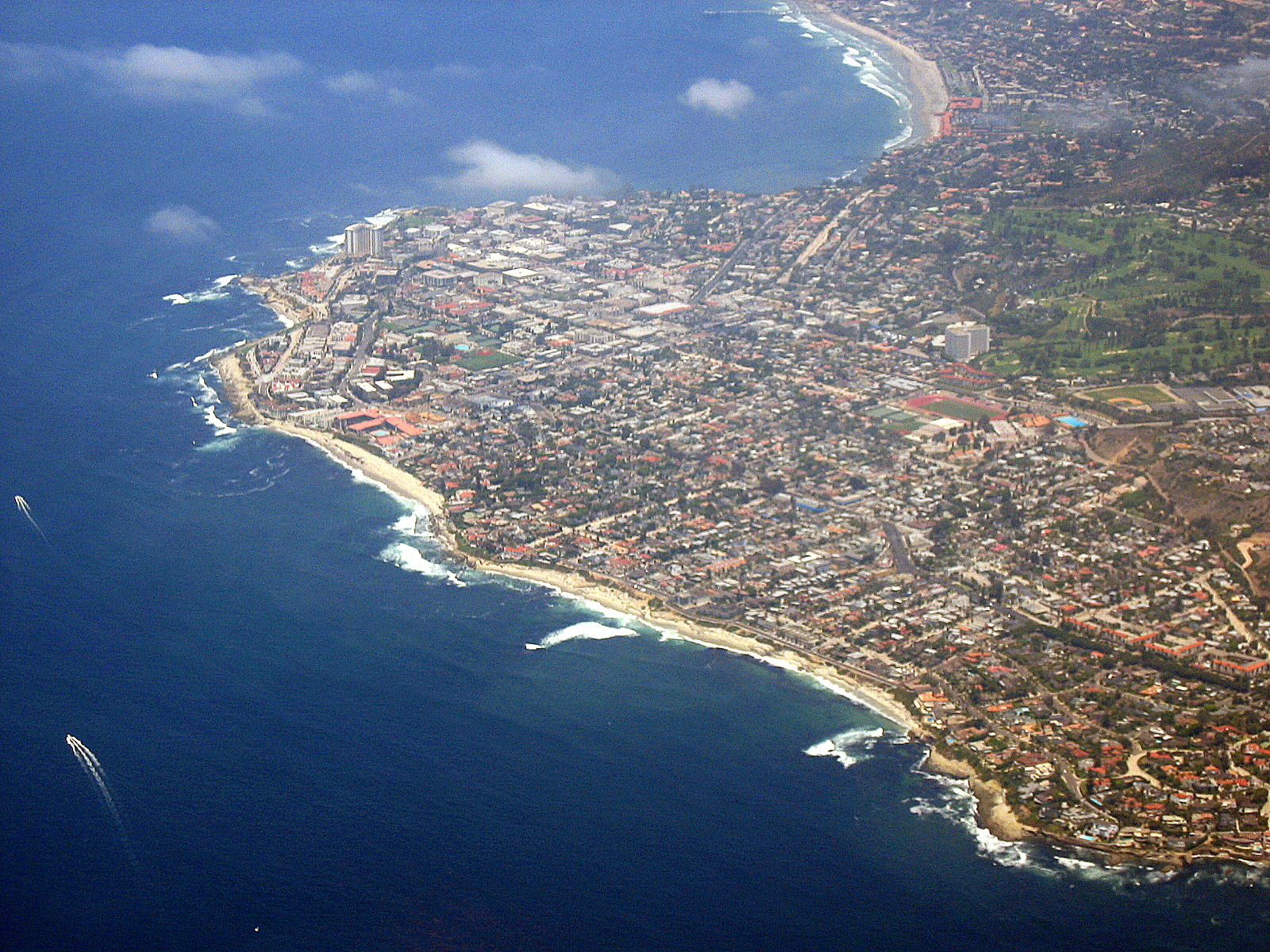 La Jolla aus der Luft, Aufnahme Richtung Nord-Osten